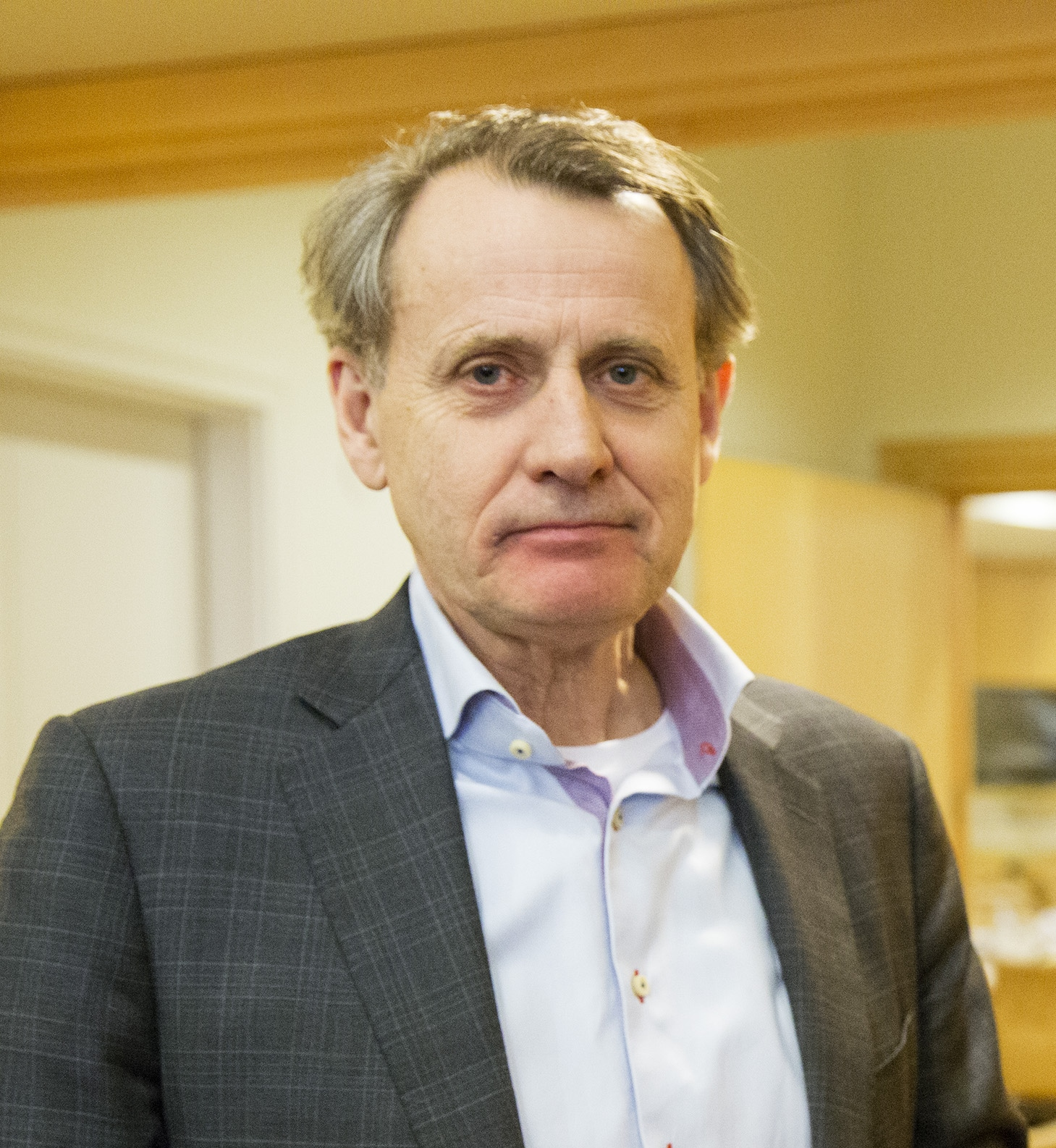 Anders Sundström 18 februari 2015